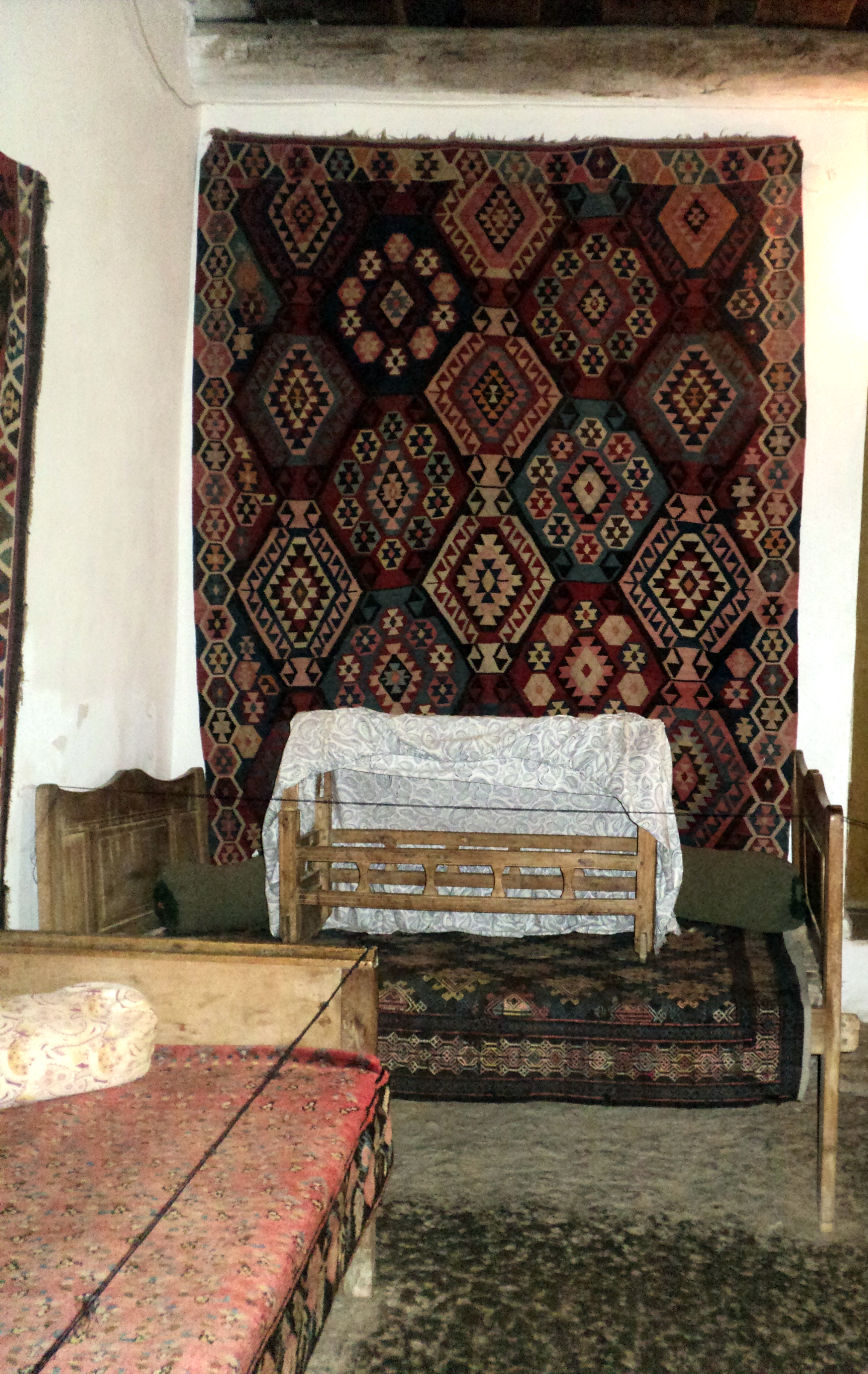 Հովհաննես Թումանյանի տուն-թանգարան, Դսեղ